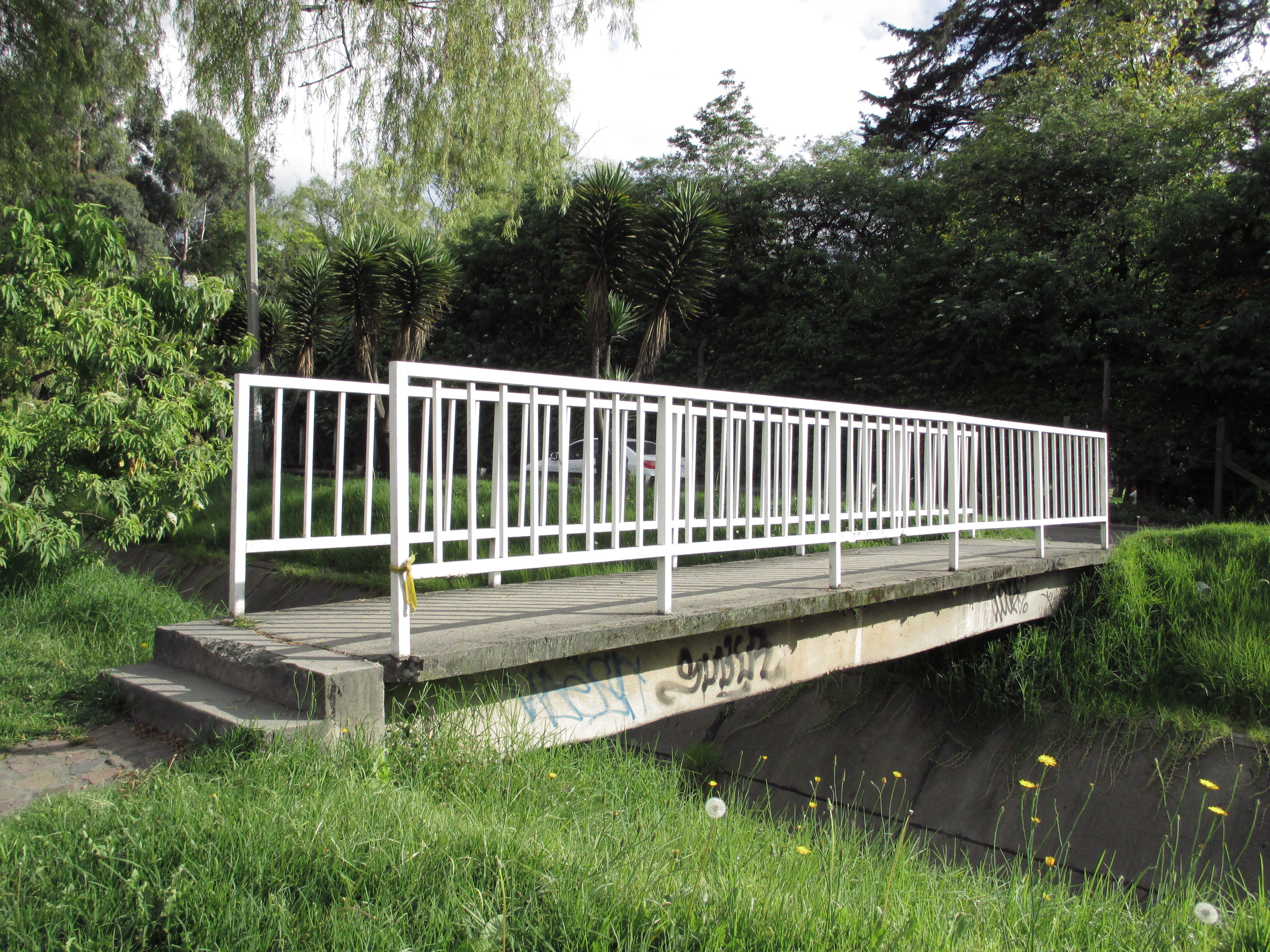 Bogotá